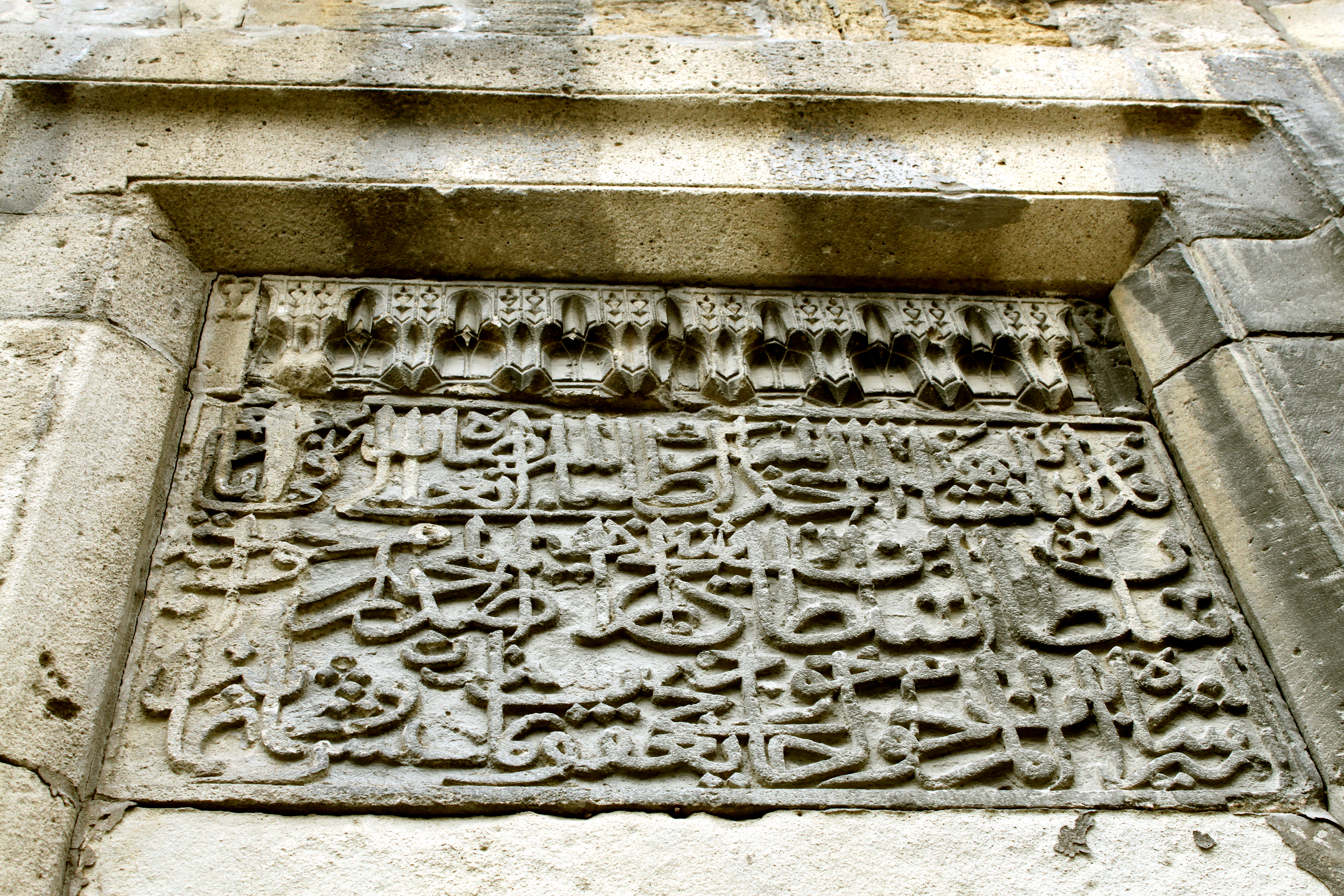 Şeyx İbrahim məscidinin kitabəsi